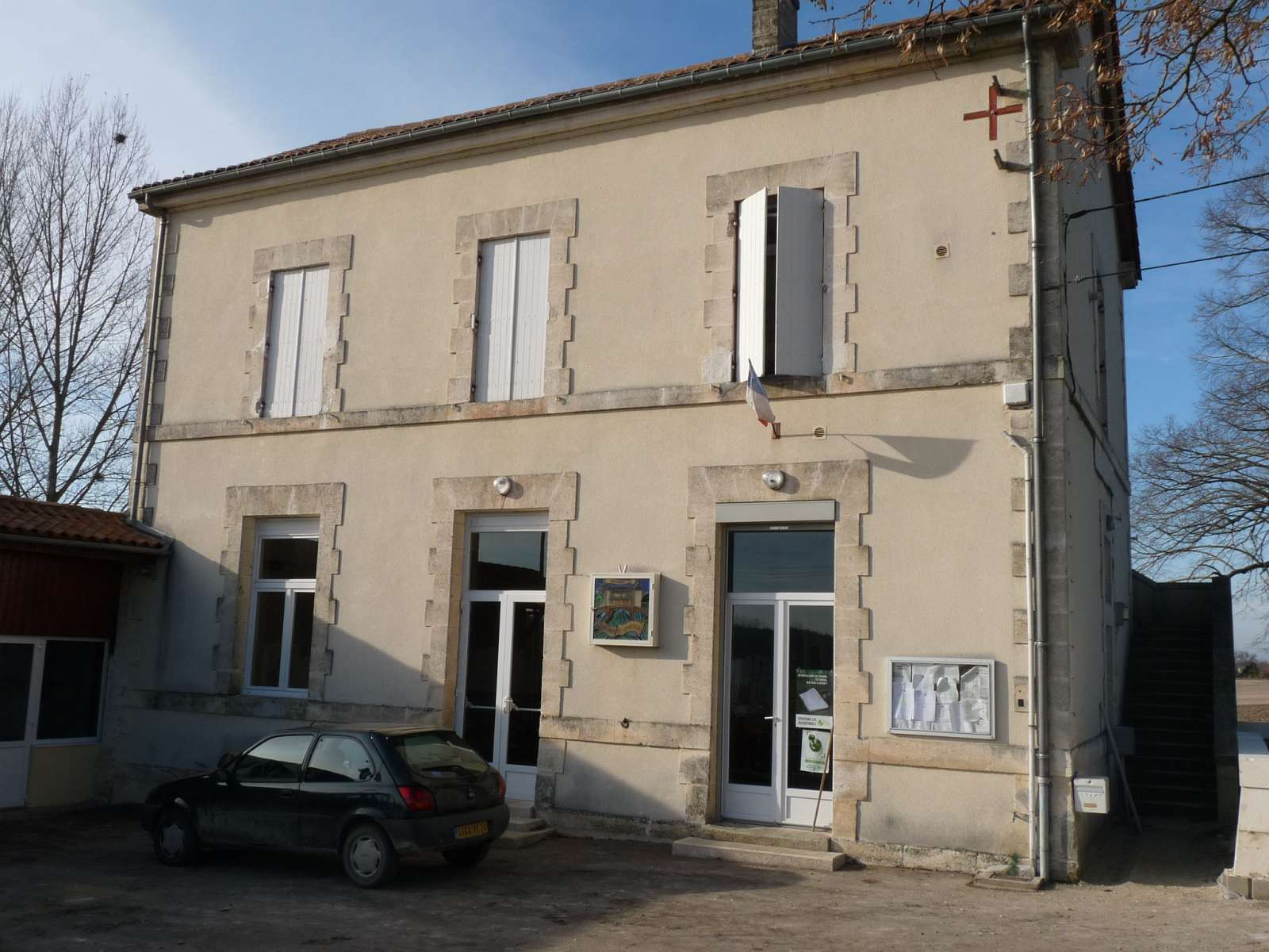 mairie à Comberanche, Dordogne, France